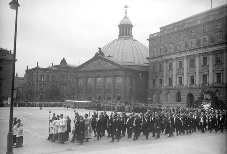 Die feierliche Fronleichnam-Prozession vor der Hedwigskirche in Berlin! Anwesend waren der ehemalige Reichskanzer Dr. Wirth, Reichspostminister Schätzel und der frühere preussische Ministerpräsident Stegerwald, sowie hohe kirchliche Würdenträger. Die feierliche Fronleichnam-Prozession unter Führung des Kuratus Knauf, unter dem Baldachin, mit dem Allerheiligsten in den Händen, passiert den Platz vor der Hedwigskirche in Berlin. Dahinter die Minister Reichspostminister Schätzel, Reichskanzler a.D. Dr. Wirth und der Reichsverkehrsminister Guerard.